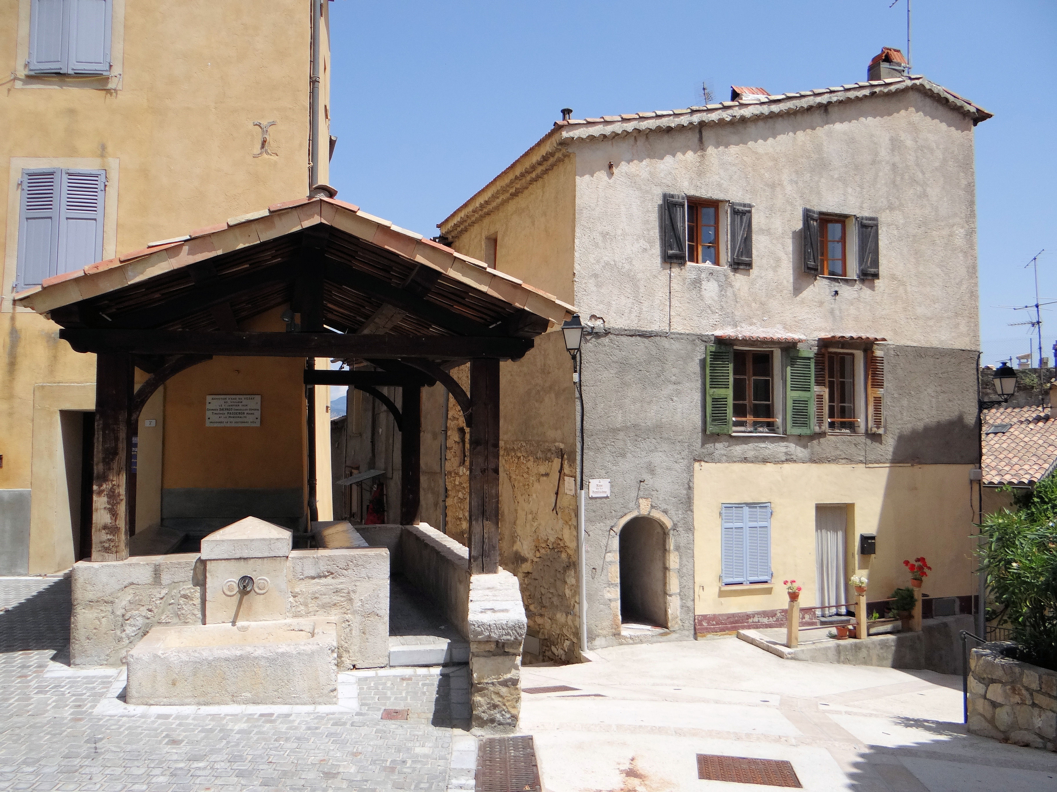 Sigale - Le lavoir devant la mairie